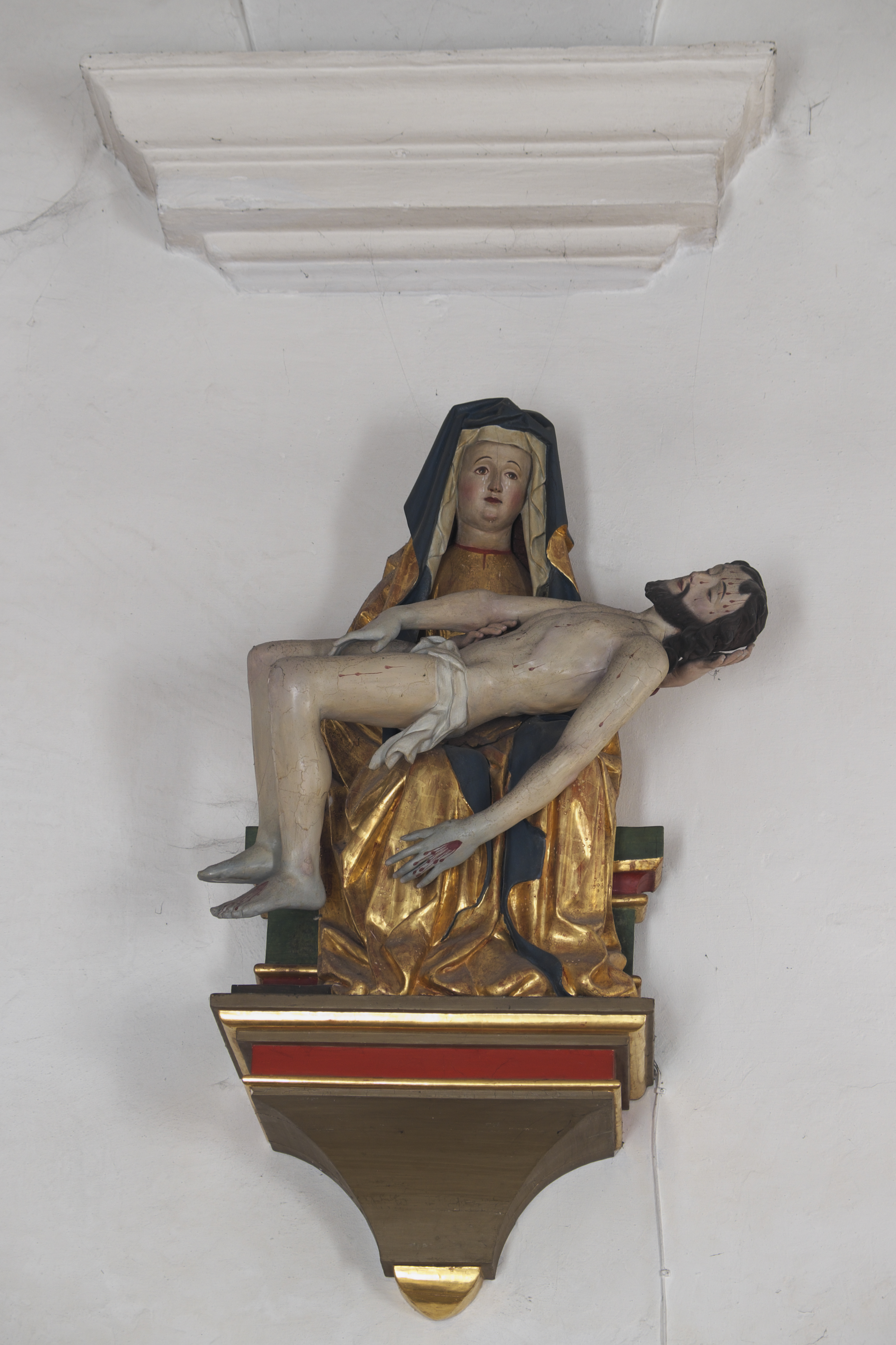 Katholische Pfarrkirche Mariä Himmelfahrt in Essenbach im Landkreis Landshut (Bayern/Deutschland), Pietà